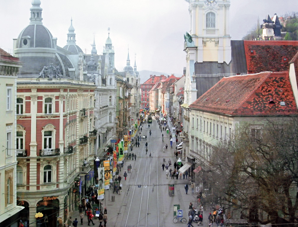 Blick vom Marienlift in die Herrengasse (Graz) 15:36, 9. Apr 2006 Chri17 1024 x 768 (273686 Byte) (* Bildbeschreibung: Blick vom Marienlift in die Herrengasse * Quelle: selbst fotografiert * Fotograf/Zeichner: ~~~ * Datum: 22.4.2003 * Sonstiges: )